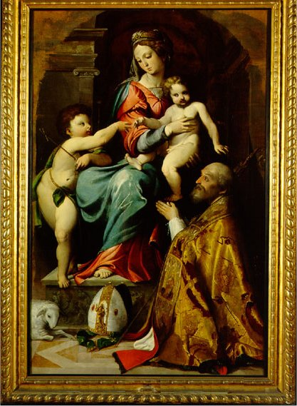 Vierge sur le trône avec l'Enfant, San Giovannino et San Nicolò